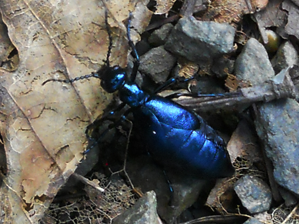 北海道富良野市にて撮影したオオツチハンミョウ